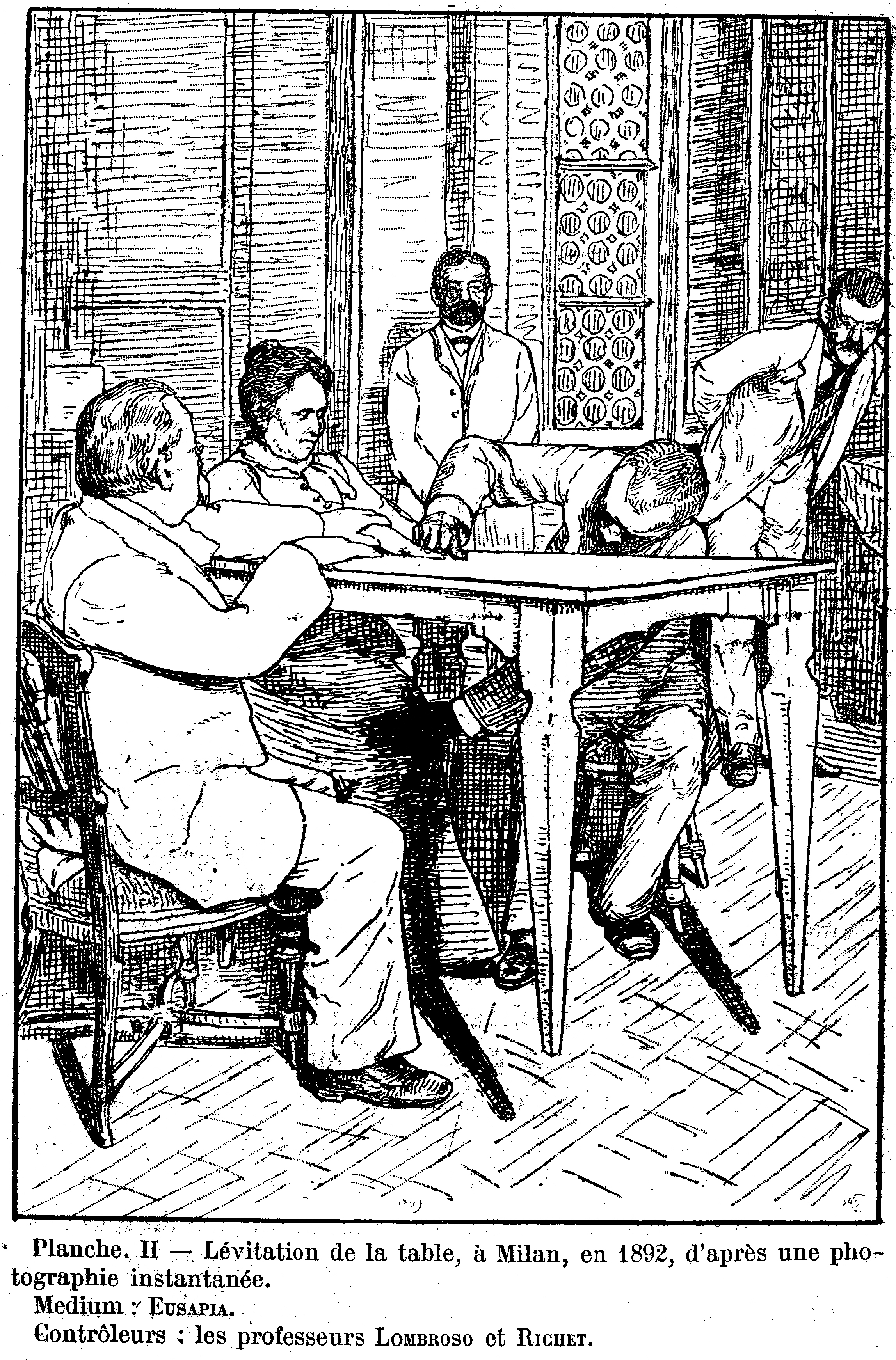 Dessin représentant une expérience menée avec la médium Eusapia Palladino en 1892.